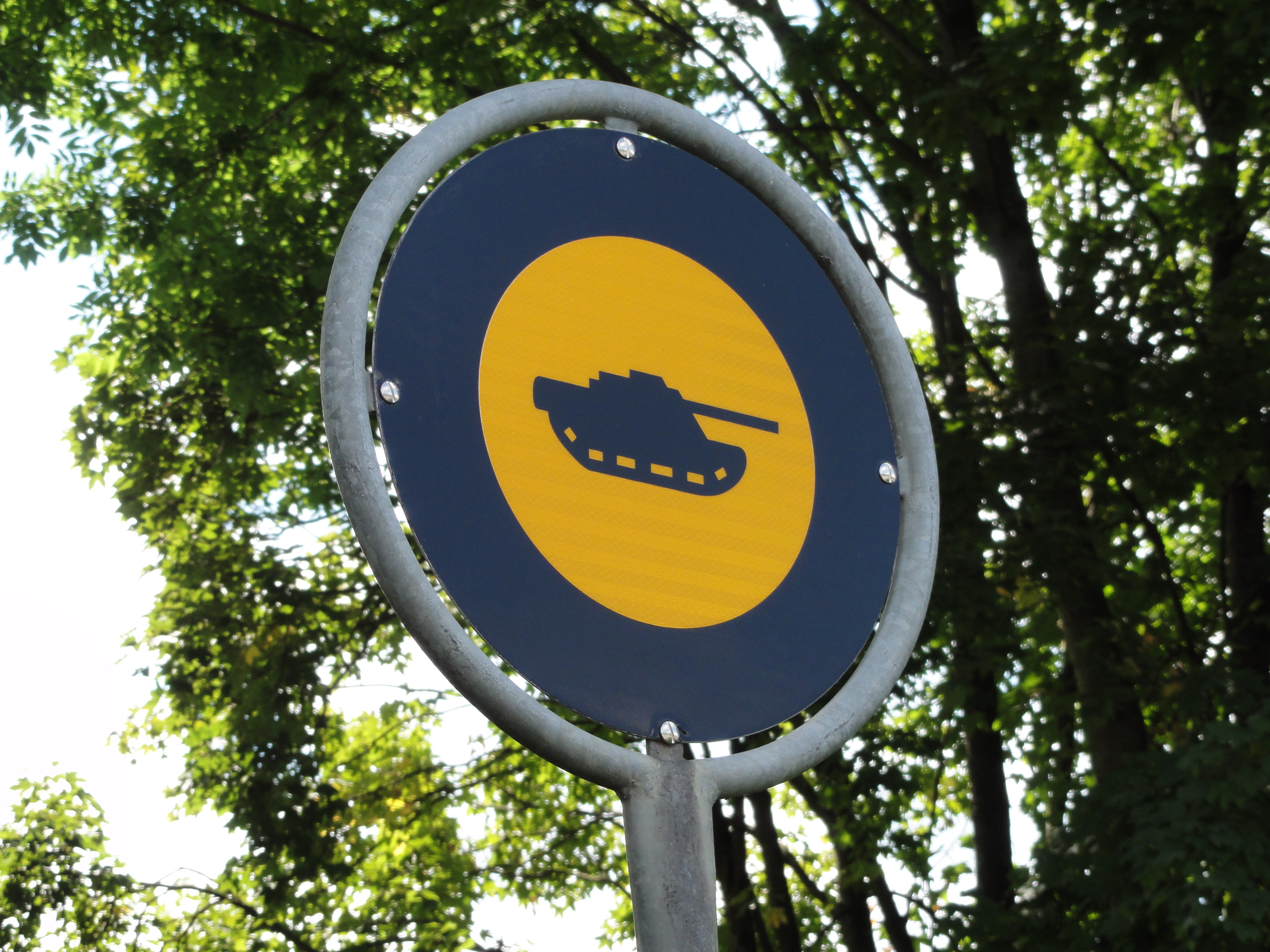 Panzerfahrverbot